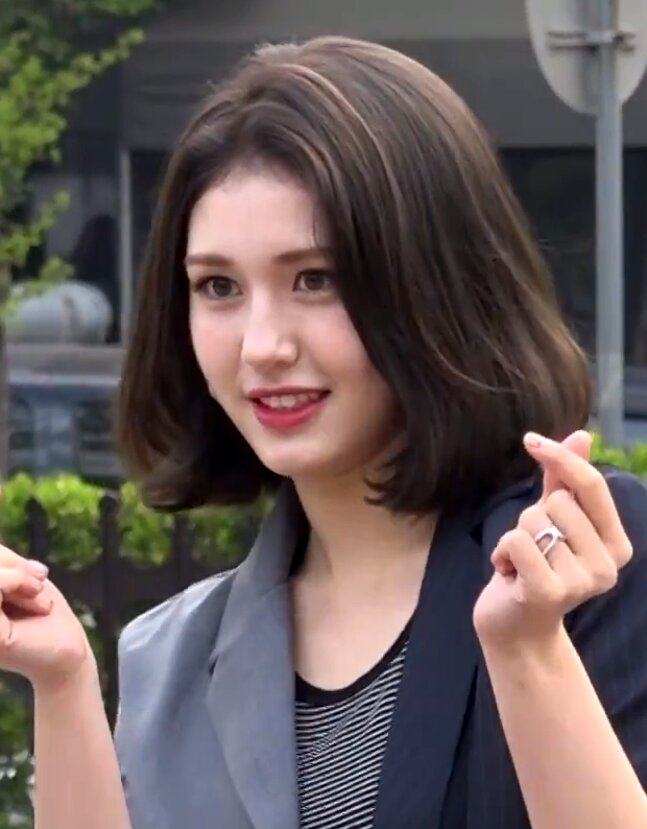 디스패치 구독 클릭! Dispatch Subscribe